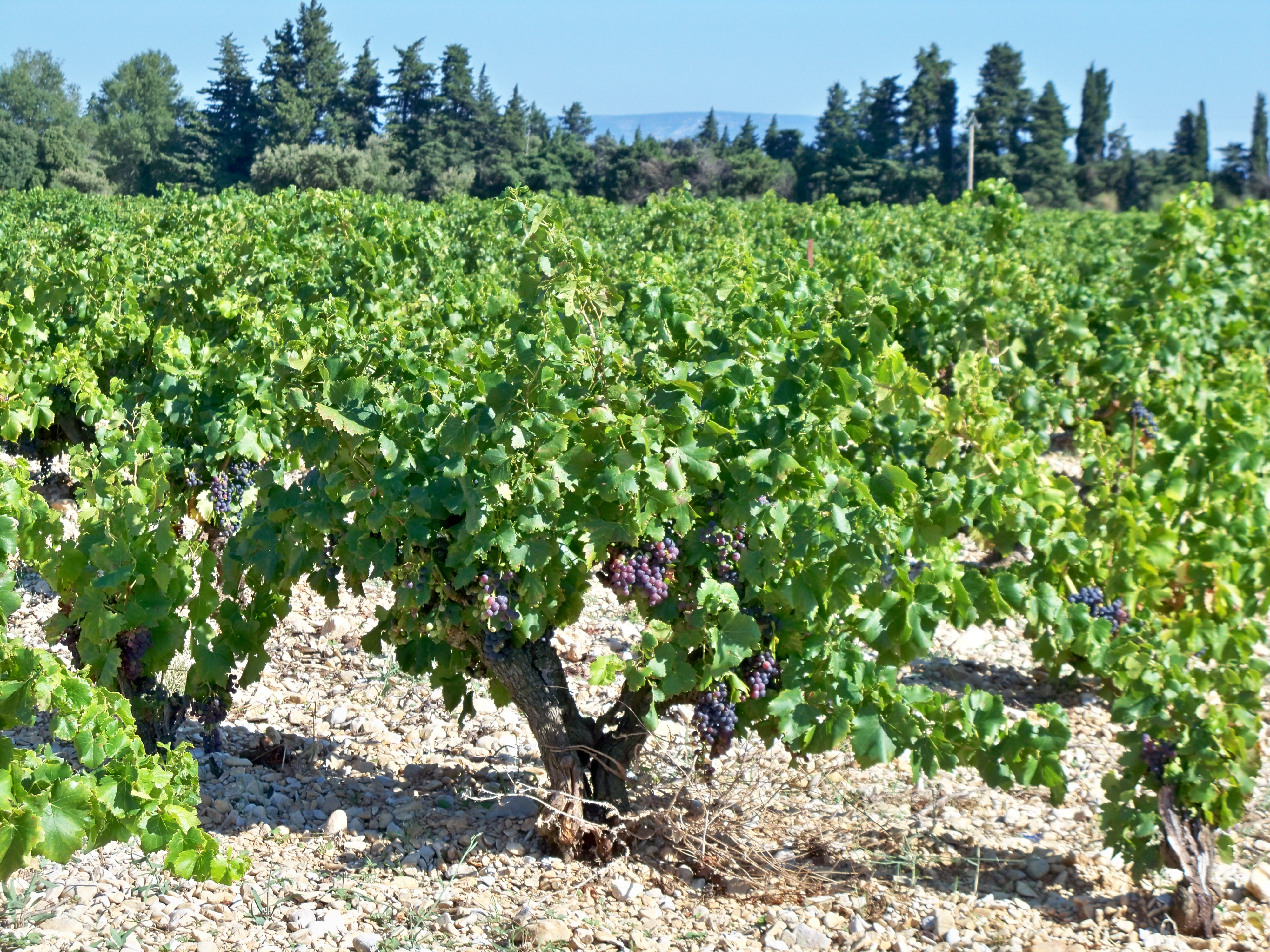 vignes à Sarrians, Vaucluse